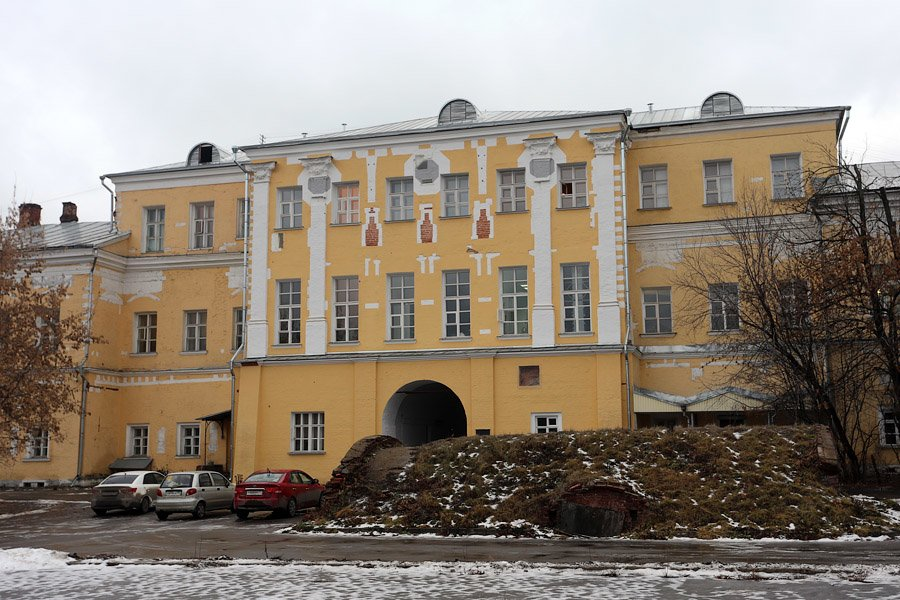 Фасады Лефортовского дворца с раскрытыми старинными архитиктурными элементами